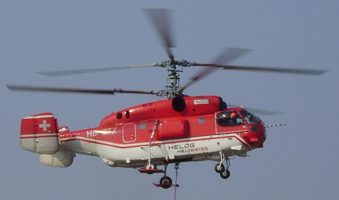 Hubschrauber (helicopter)Kamov Ka-32